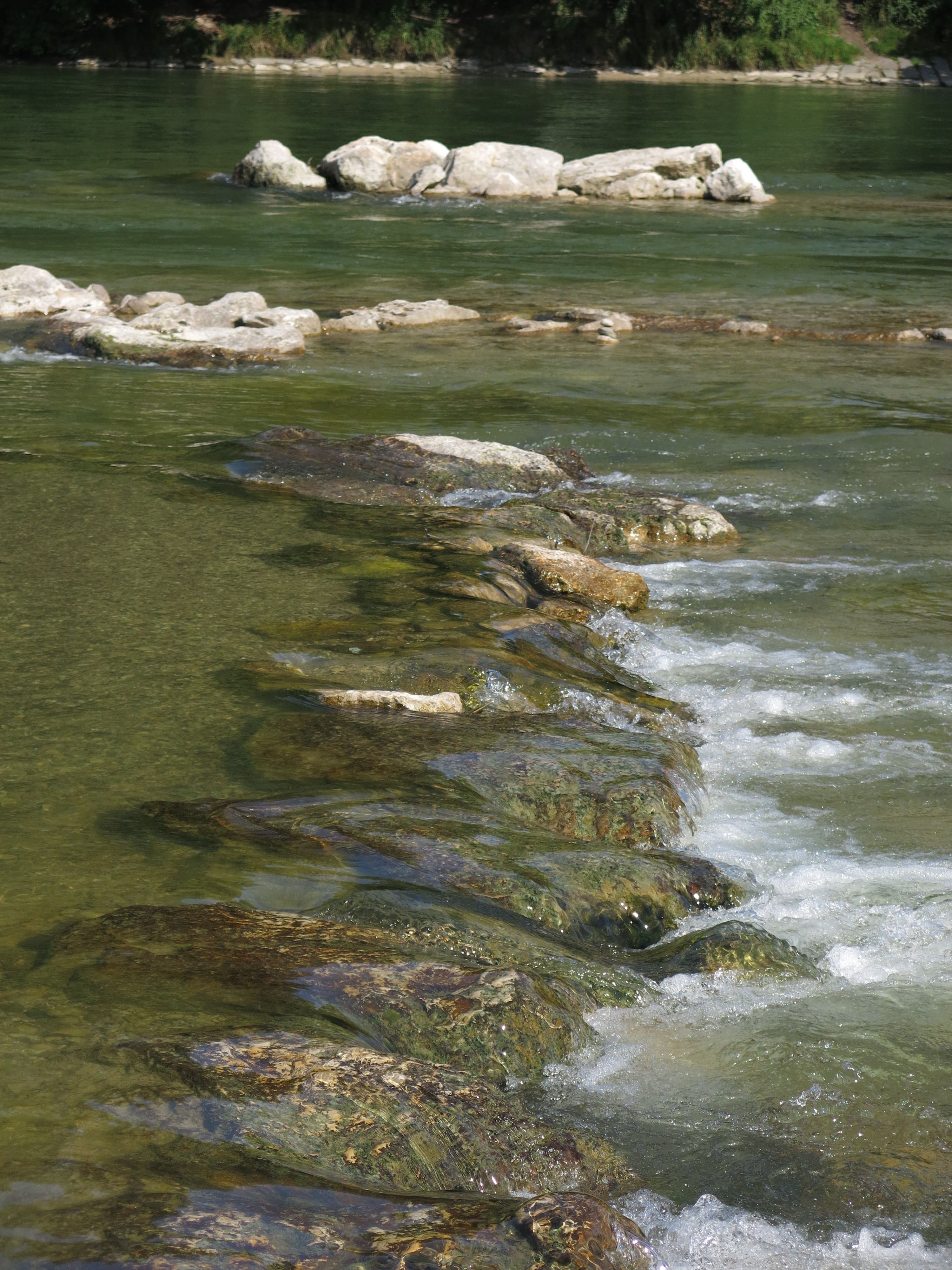 Naturnah gestaltete Sohlrampe in der Isar